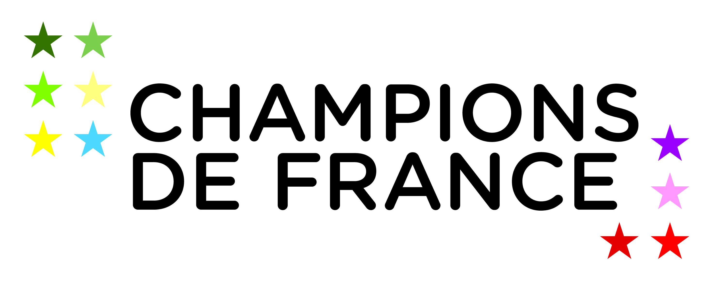 Logo de la Série Champions de France